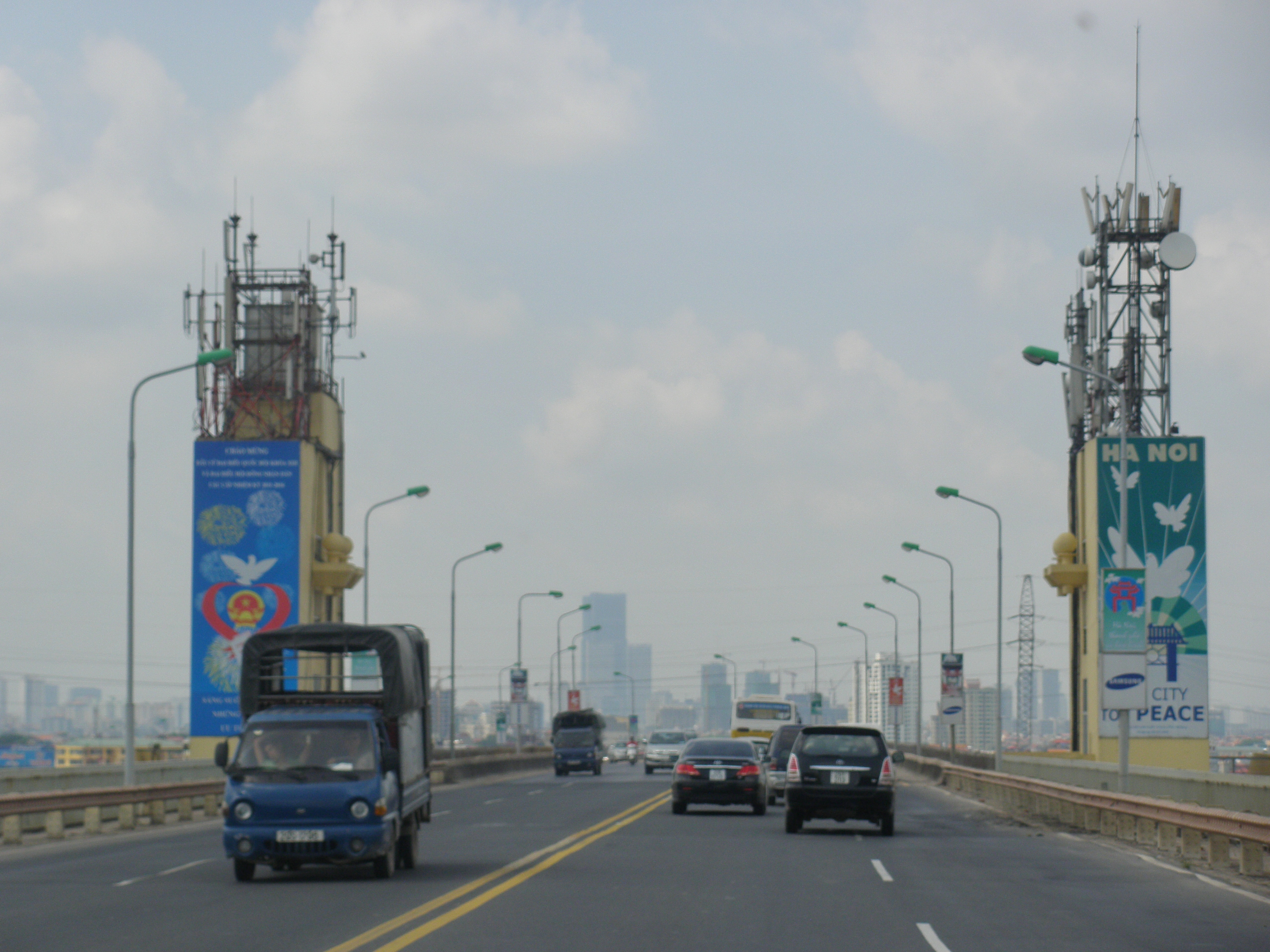 Cầu Thăng Long, đoạn qua phường Đông Ngạc.